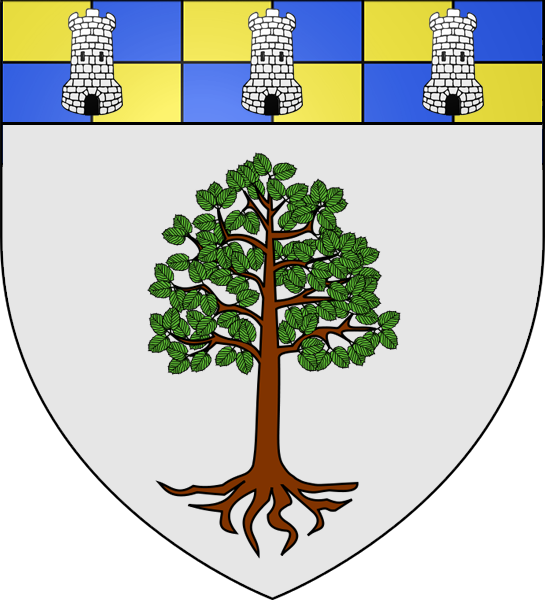 Blason non-officiel de la commune d'Aunay-sous-Crécy, Eure-et-Loir, France : D'argent à l'aulne, au chef échiqueté d'or et d'azur chargé de trois tours d'argent.